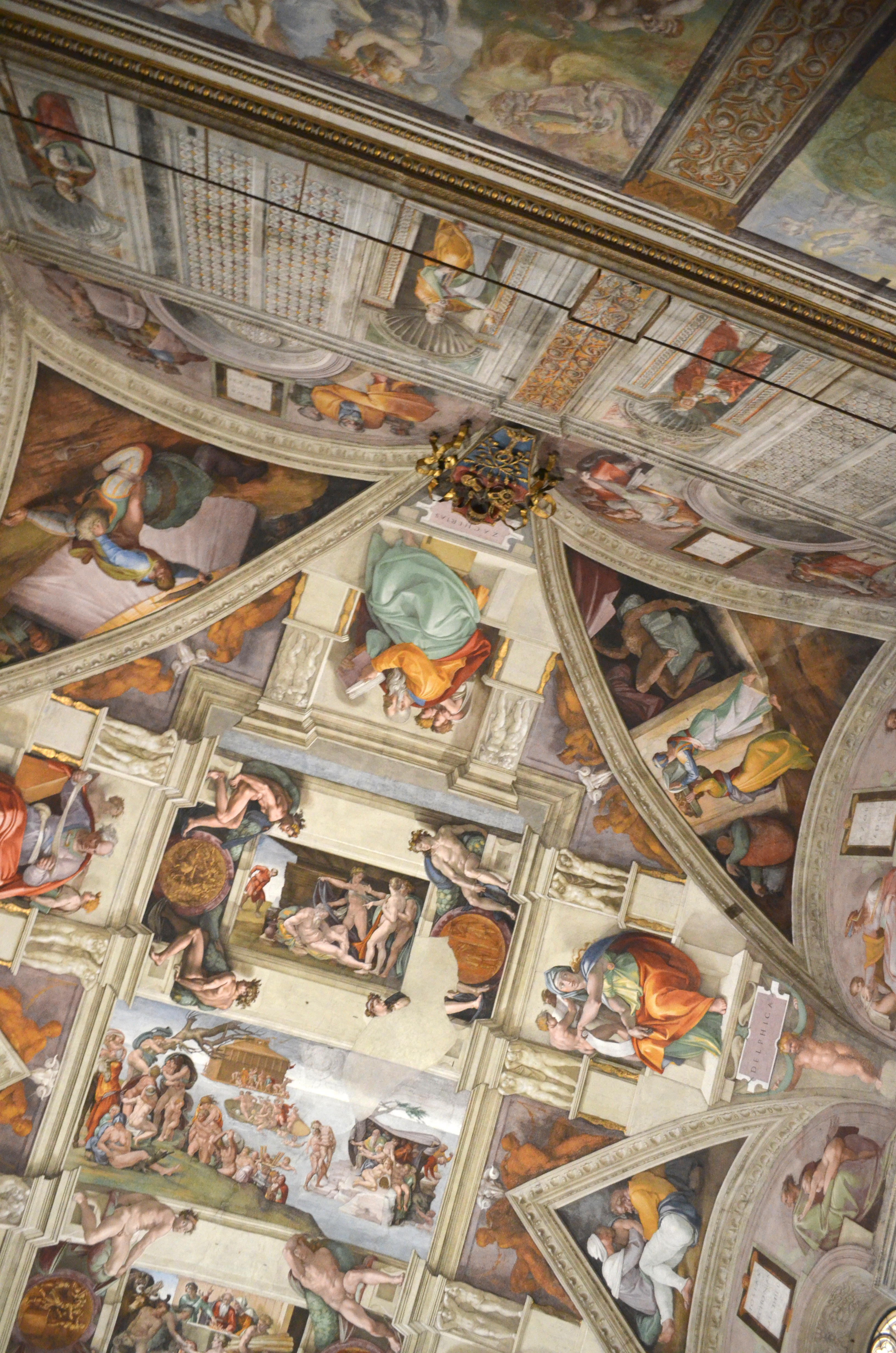 Vatican Museums